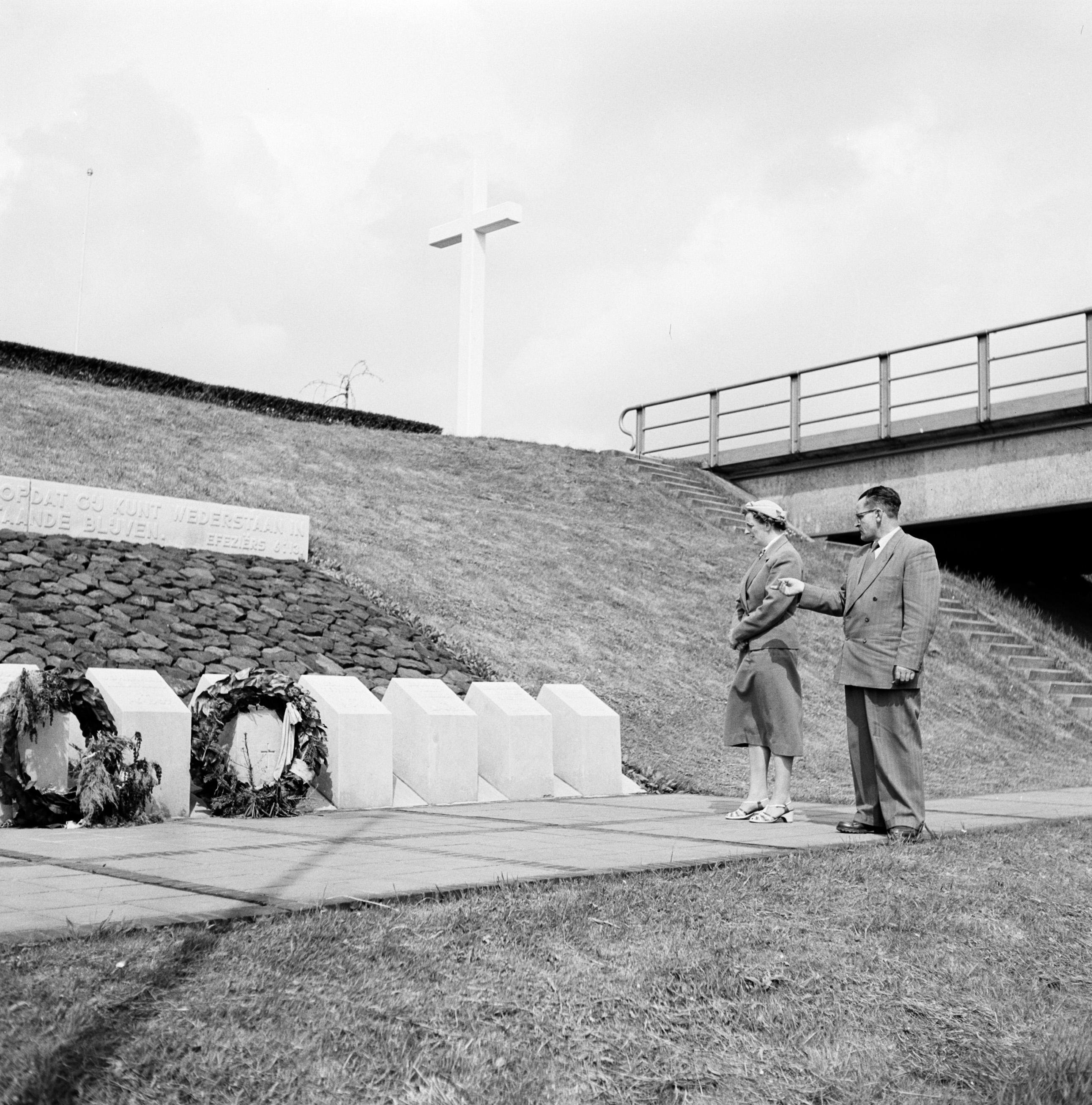 Collectie / Archief : Fotocollectie Van de Poll Reportage / Serie : [ onbekend ] Beschrijving : Ynse Postma en echtgenote bij het gedenkteken voor de fusillade van 11 april 1945 aan de voet van de dijk van het Van Harinxmakanaal bij Dronrijp. Postma wijst naar de plek waar hij Gerard de Jong aantrof Annotatie : Gerard de Jong overleefde als enige een fusillade op 7 april 1945 bij Dronrijp. Ynse Postma verleende De Jong eerste hulp en hielp bij diens transport naar een onderduikadres Datum : 1955-00-01 Locatie : Dronrijp, Friesland, Van Harinxmakanaal Trefwoorden : EHBO, bezoekers, dijken, executies, gedenktekens, hulpverlening, kransleggingen, onderduikers Persoonsnaam : Postma, Ynse Fotograaf : Poll, Willem van de Auteursrechthebbende : Nationaal Archief Materiaalsoort : Negatief (6x6) Nummer archiefinventaris : bekijk toegang 2.24.14.02 Bestanddeelnummer : 254-3344